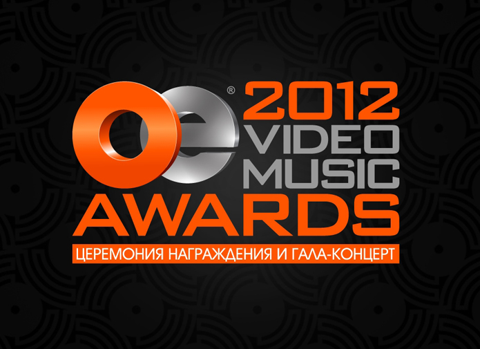 Официальный логотип OE VIDEO MUSIC AWARDS 2012